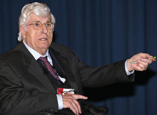 Francisco Torrent-Guasp, conferencia en Madrid.